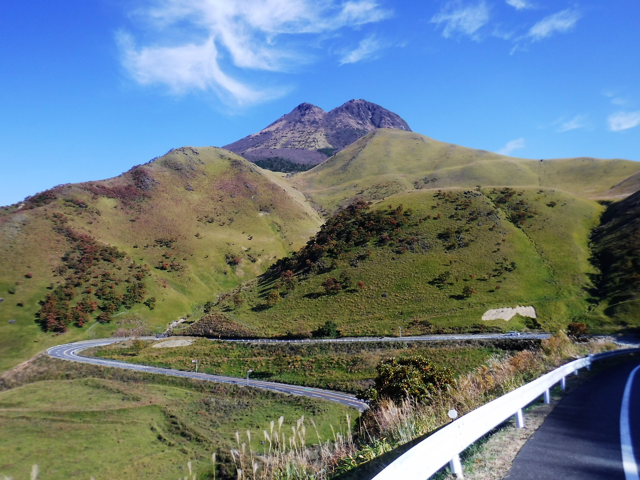 熊本県道11号別府一の宮線からみた由布岳（中央奥）。右手前のピークは飯盛ヶ城（1067m）で由布岳の寄生火山の一つ。